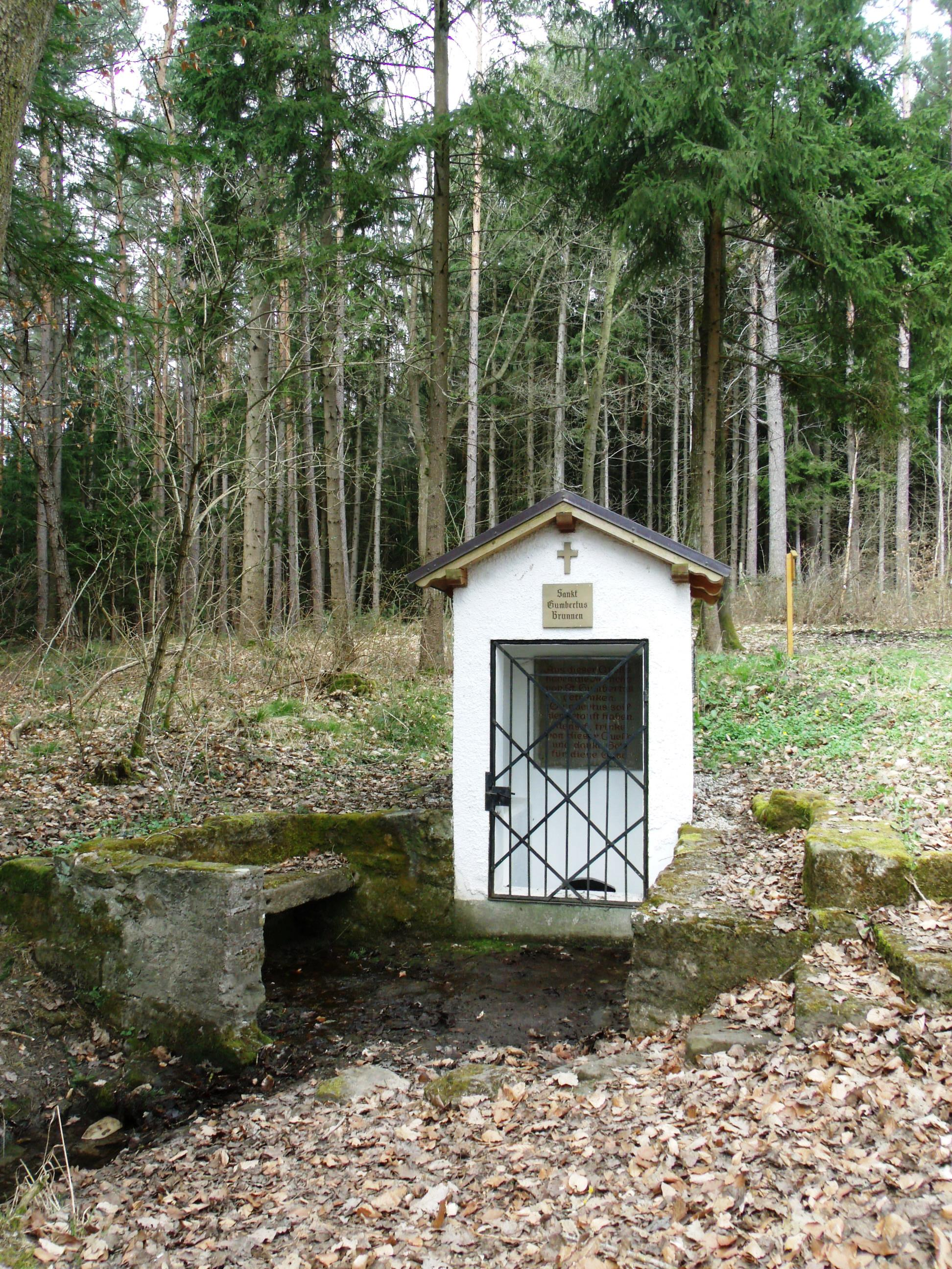 Gumbertusbrunnen bei Hinterholz, Ortsteil von Leutershausen im mittelfränkischen Landkreis Ansbach